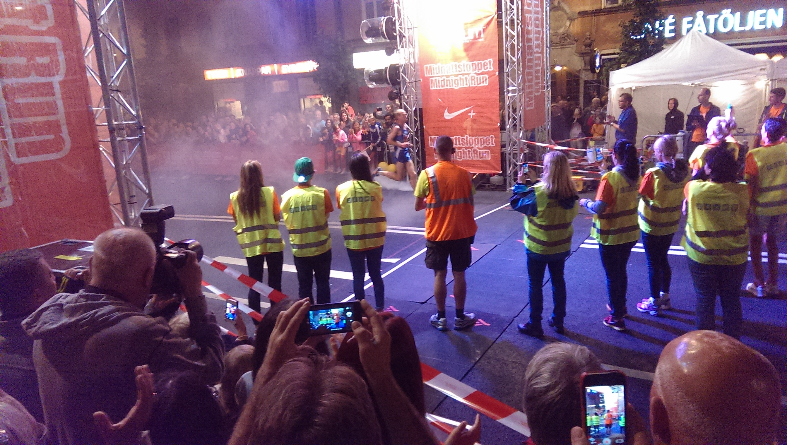 Olle Walleräng winning Midnattsloppet in Stockholm 2013